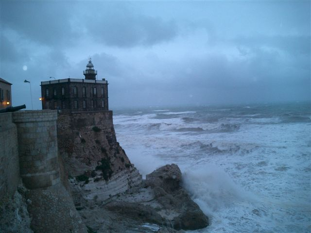 Faro de Melilla, en España